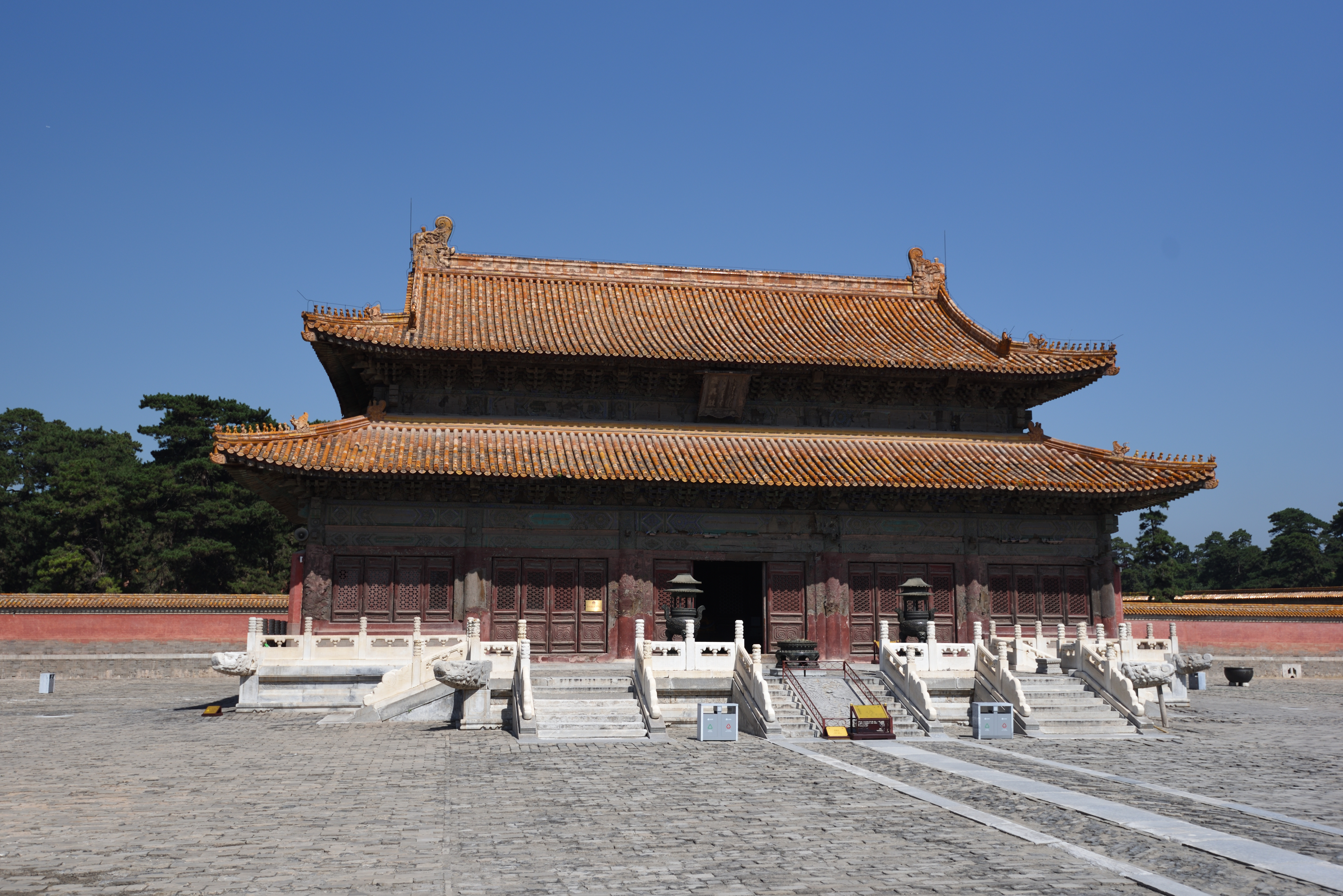 清泰陵（雍正墓）